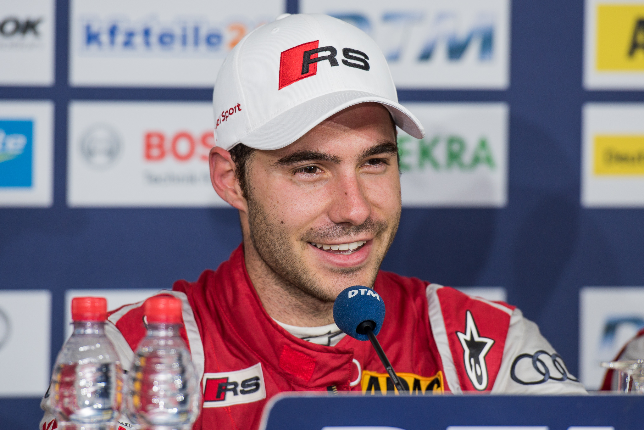 Abt Sportsline GmbH,DTM,Deutsche Tourenwagen Masters,Hockenheimring,Miguel Molina,Motorsport,Pressekonferenz